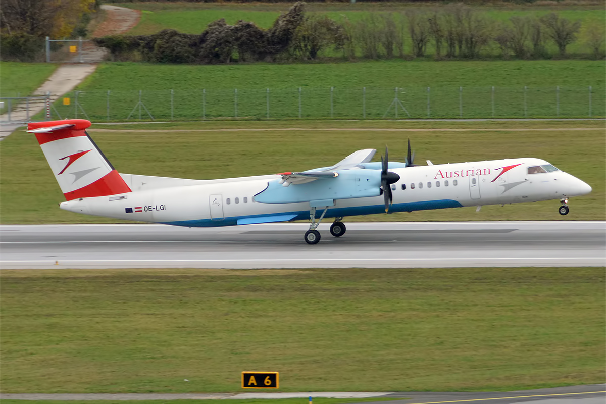 Austrian Airlines, OE-LGI, Bombardier Dash 8-402Q